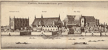 Wenzel Hollar: Ansicht von Westminster; Kupferstich 17. Jahrhundert